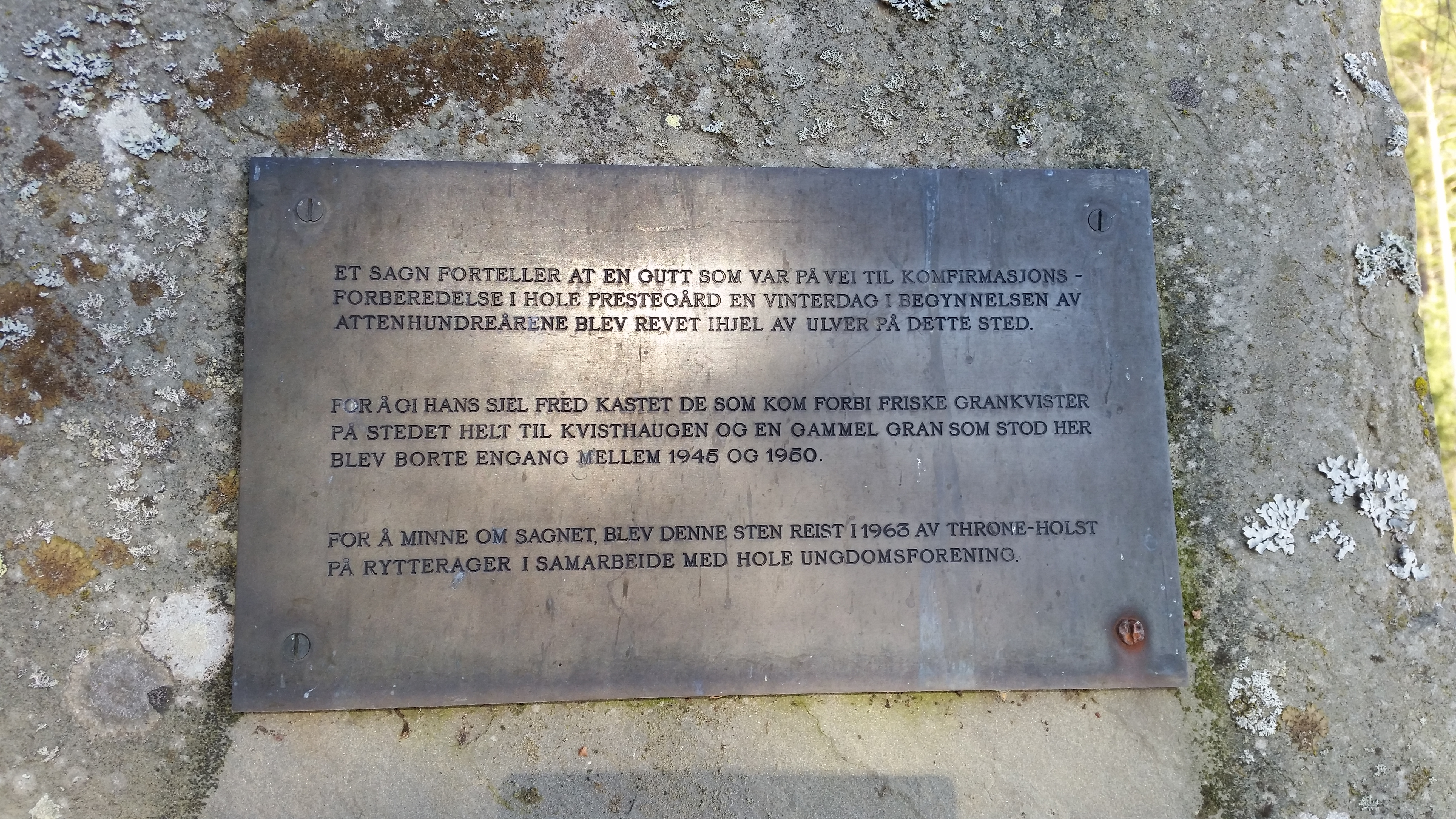 Metallplaten er passert på baksiden av minnesteinen.